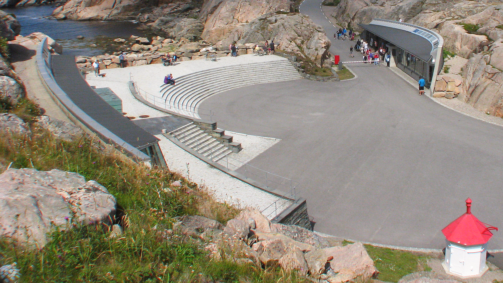 Lindesnes left Millenium-FjellIhallen in the Rocks 2004 and Lighthouse museum shop right Norway Foto 2010 Wolfgang Pehlemann IMG_1171